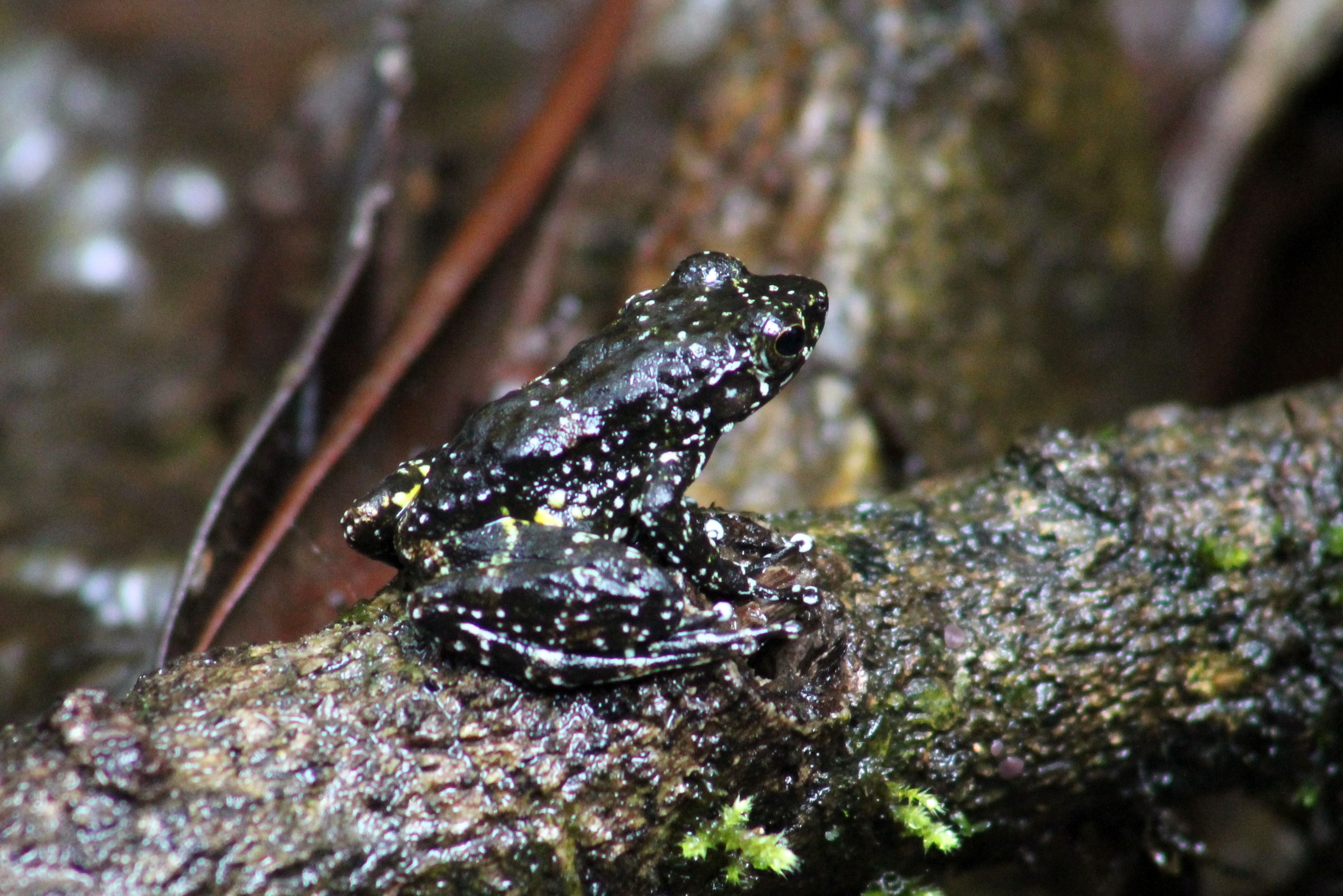 Mantidactylus cowanii in Ranomafana